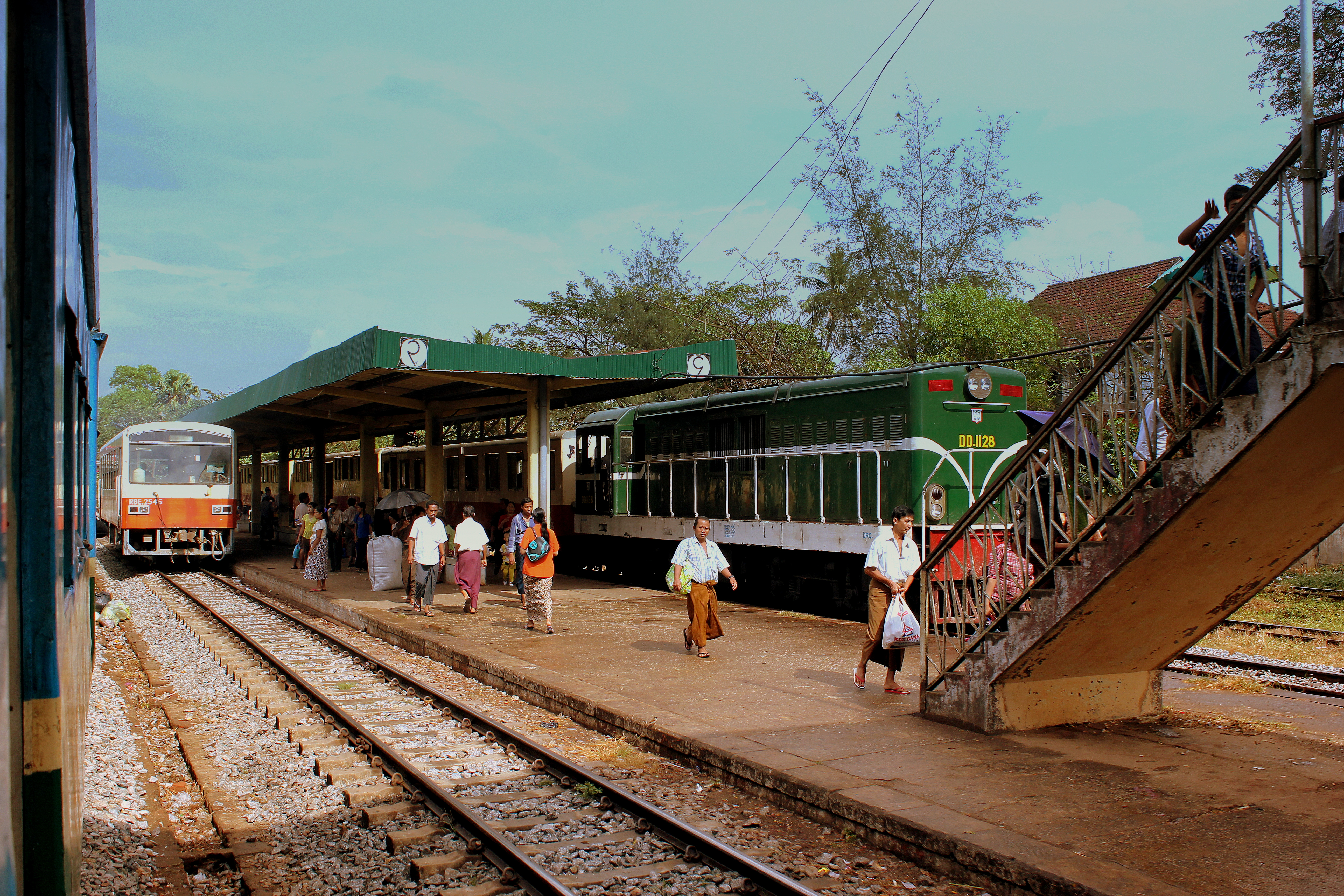 YANGON CIRCULAR RAILWAY YANGON MYANMAR JAN 2013